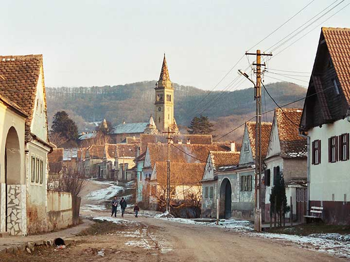 Amnas - Amnaş